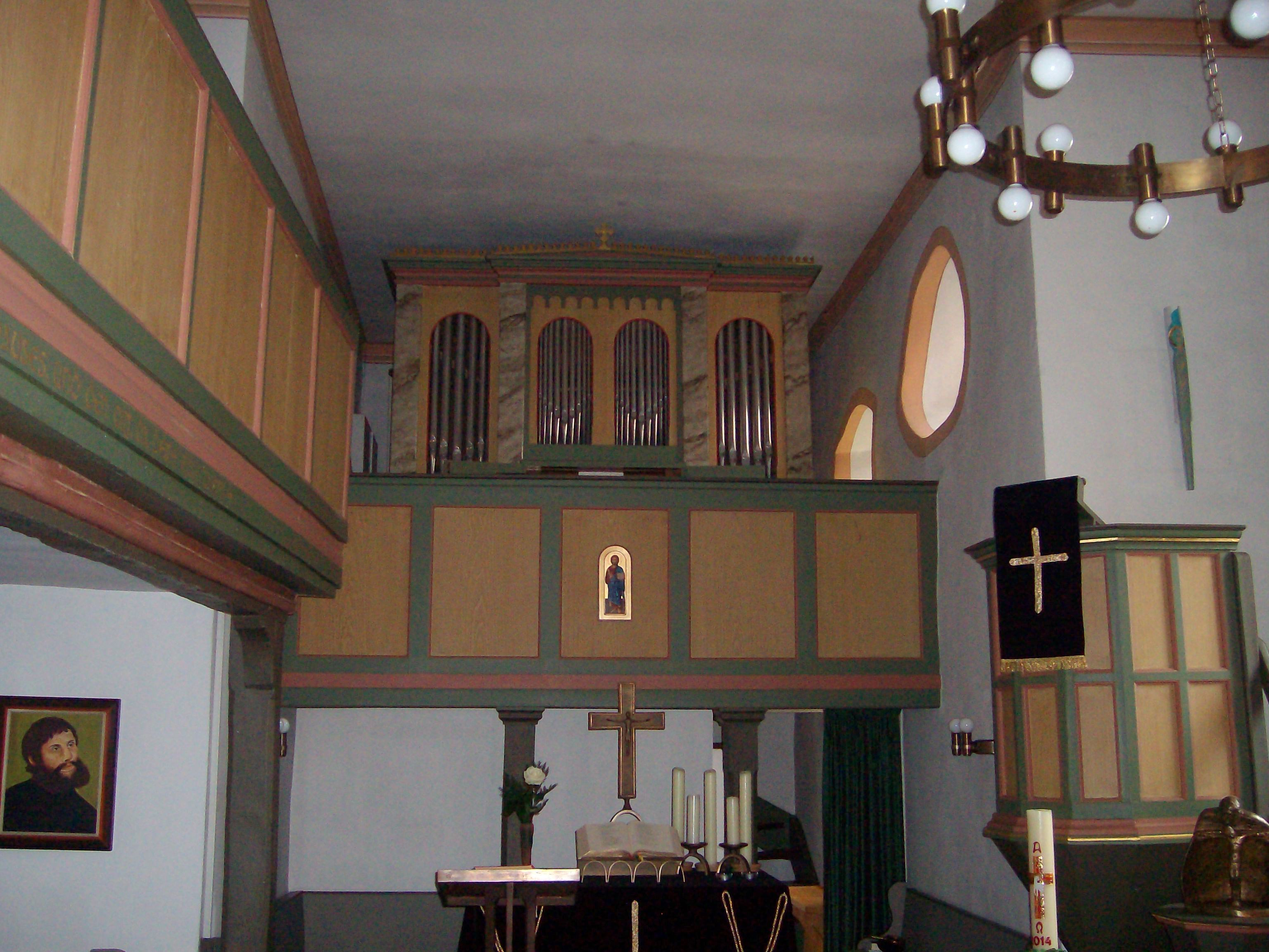 Evangelische Kirche Harbach, Grünberg, Landkreis Gießen, Hessen, Deutschland